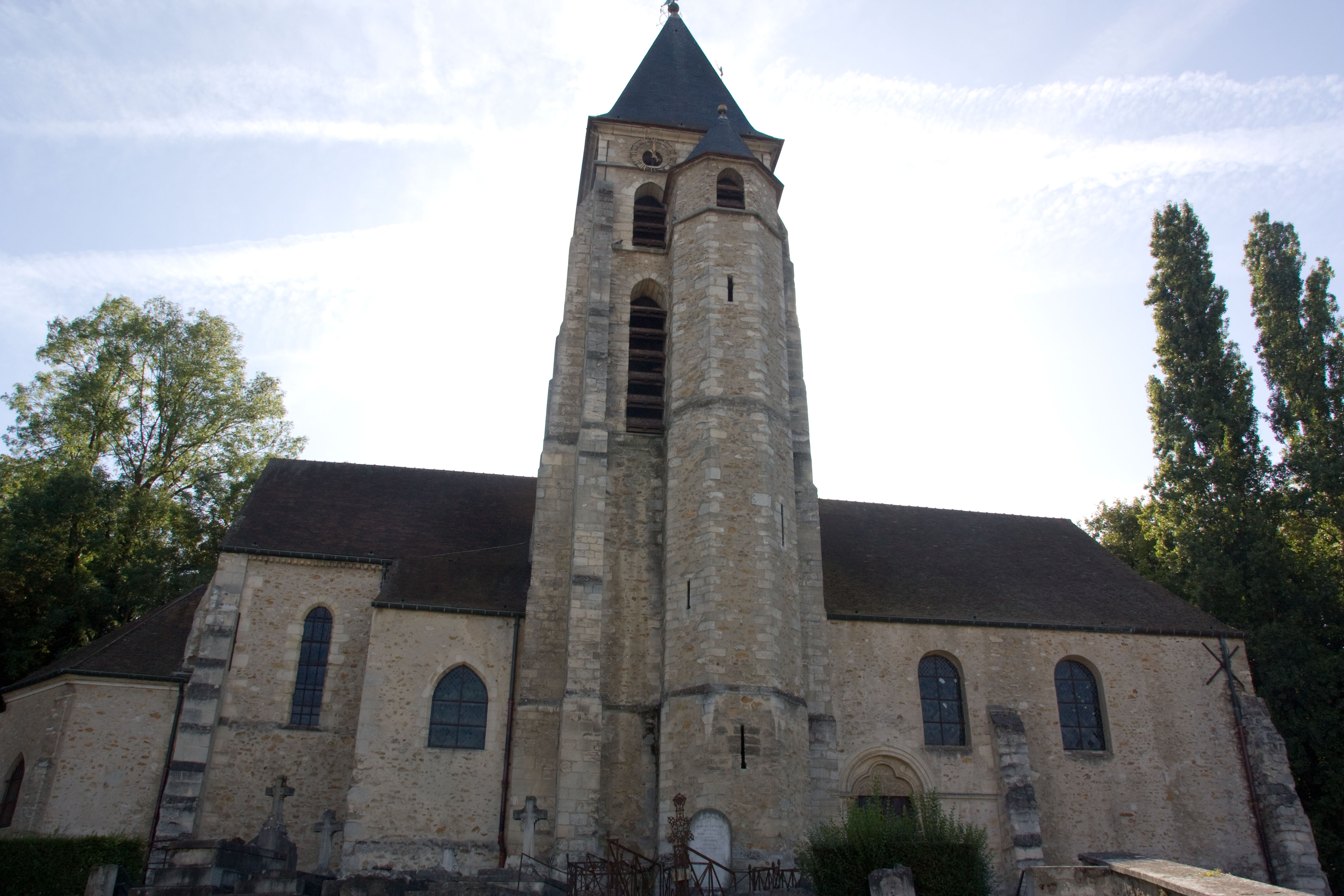 Eglise Saint-Denis de Viry-Chatillon, Viry-Chatillon, Essonne, France